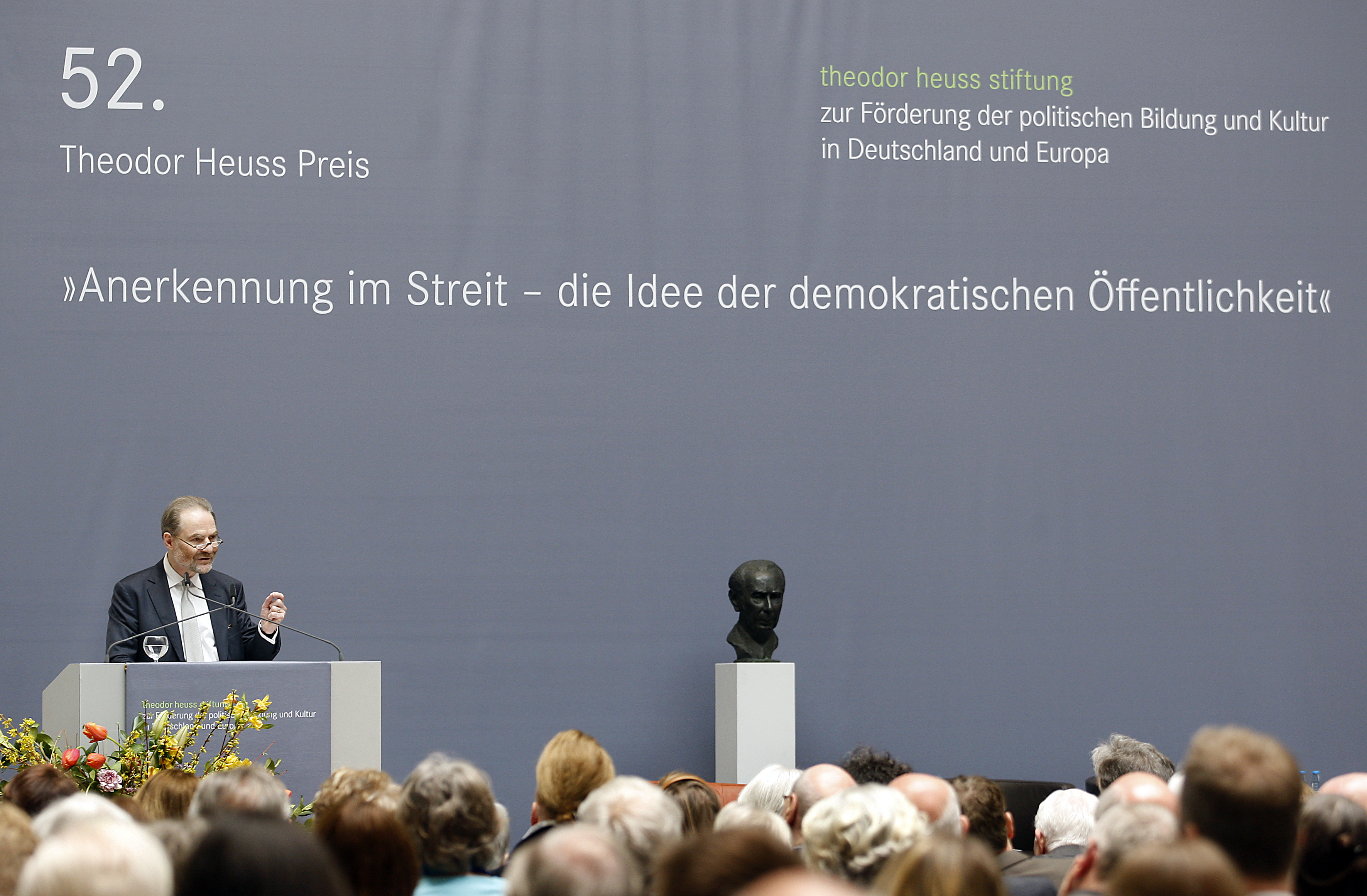 Fotografin: Susanne Kern